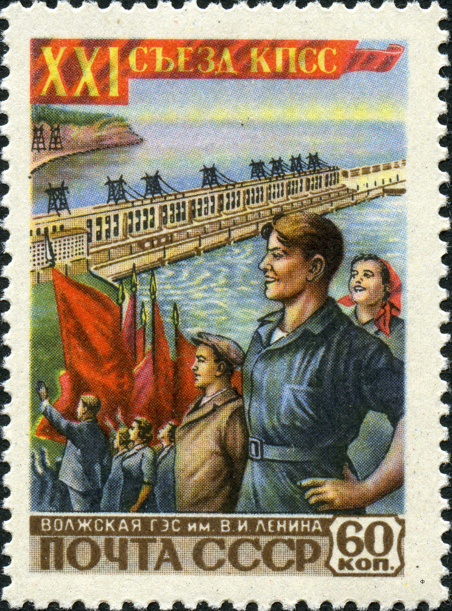 Марка СССР